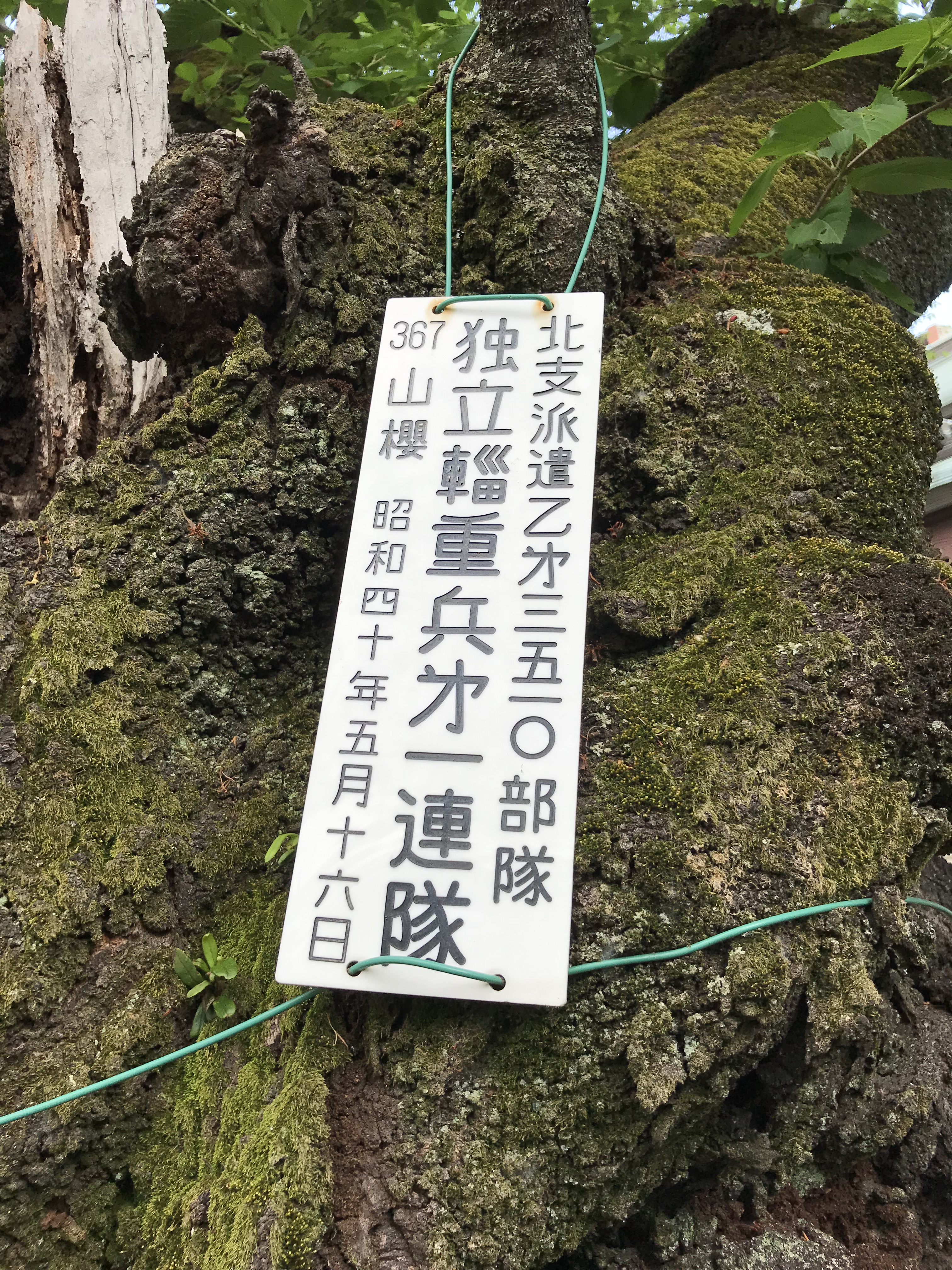 独立輜重兵第一連隊